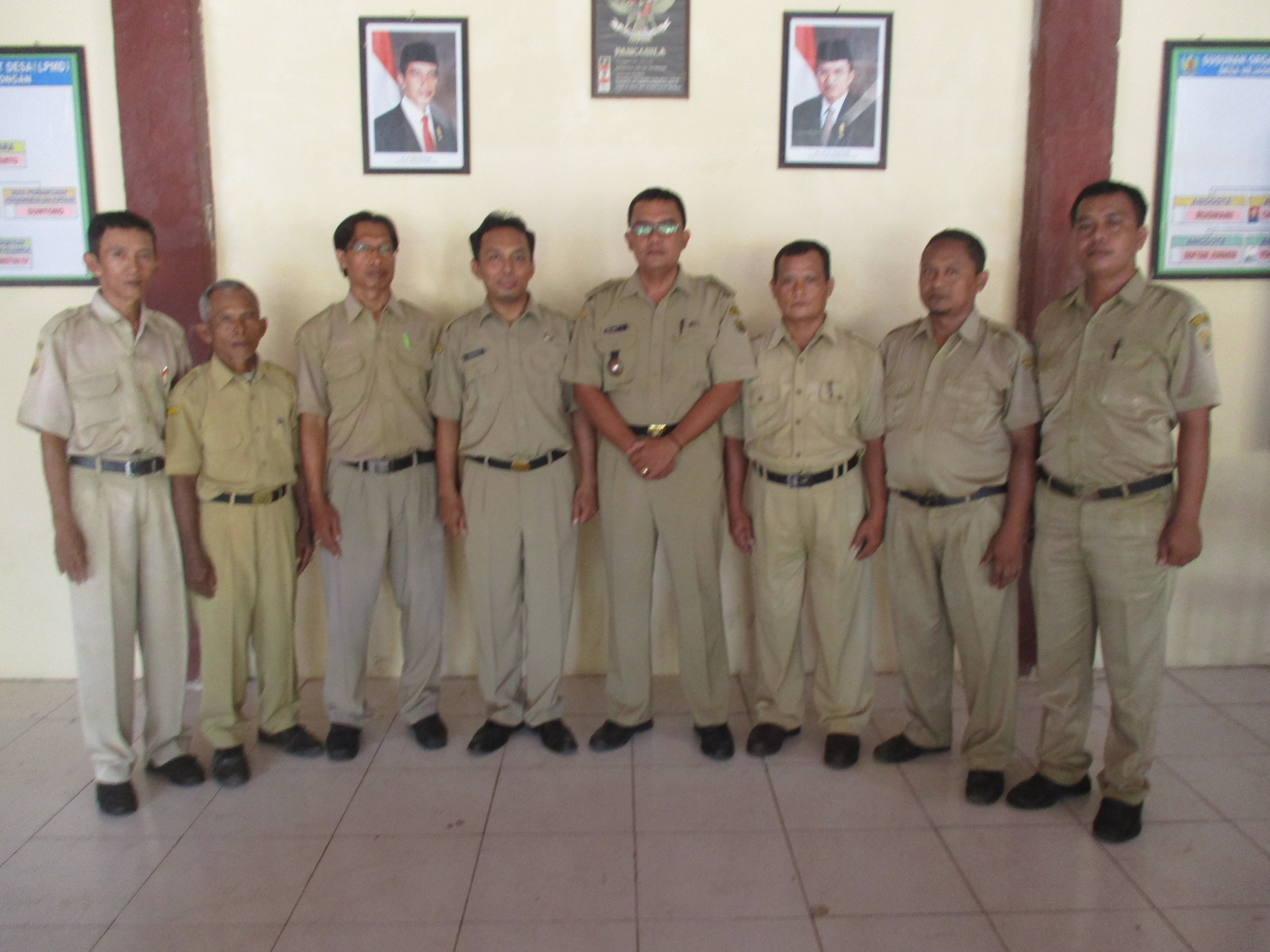 PERANGKAT DESA MEJASEM